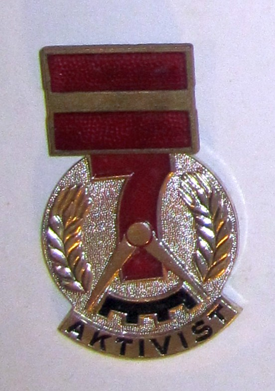 Aktivistenabzeichen Siebenjahrplan 1967